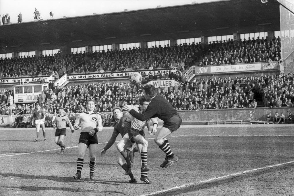 im Holsteinstadion. Im Bild u.a. Holsteins Stürmer Gerd Koll (3.v.r.). Der Sieg sichert Holstein Kiel die Nordmeisterschaft.